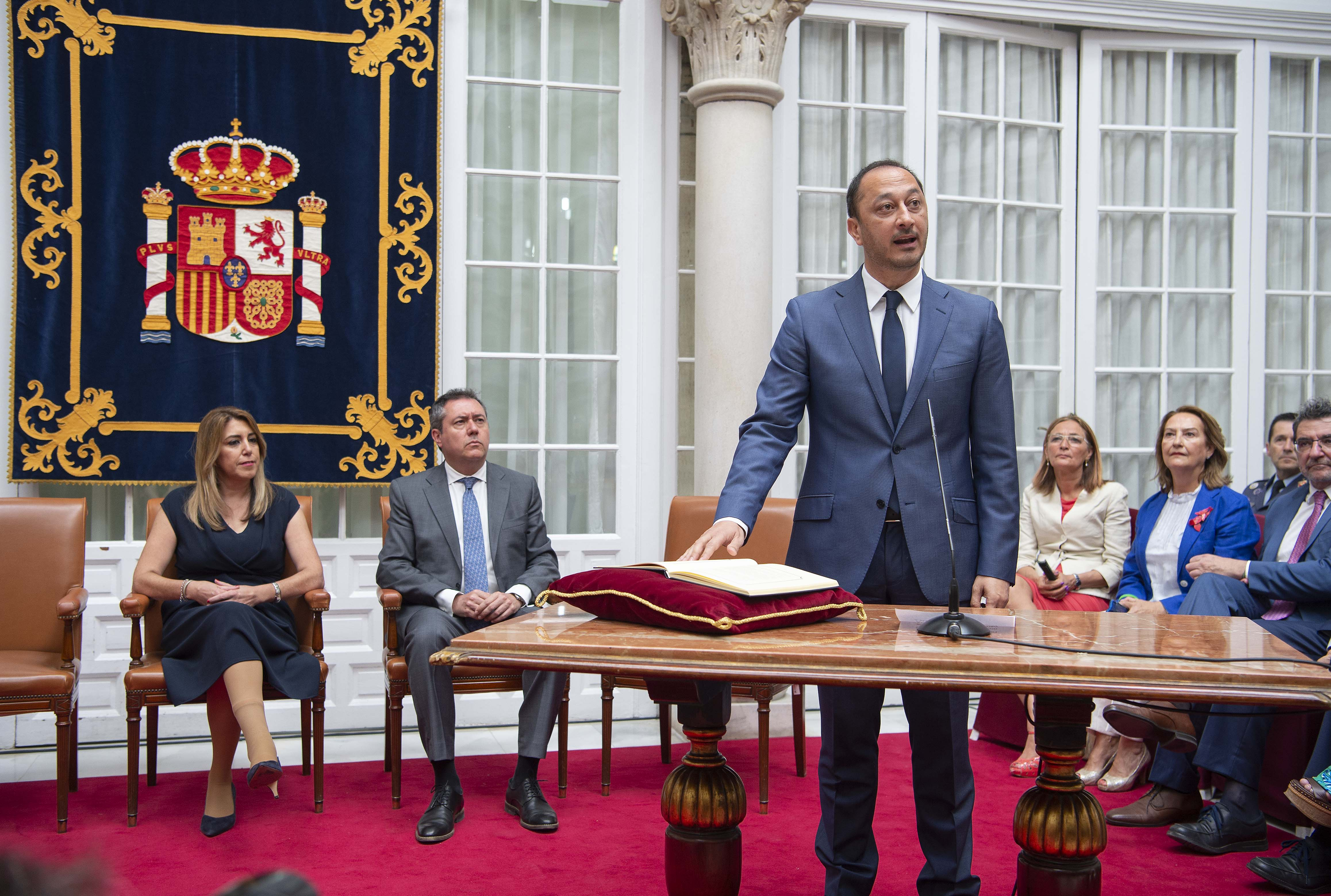 Toma de posesión del delegado del Gobierno